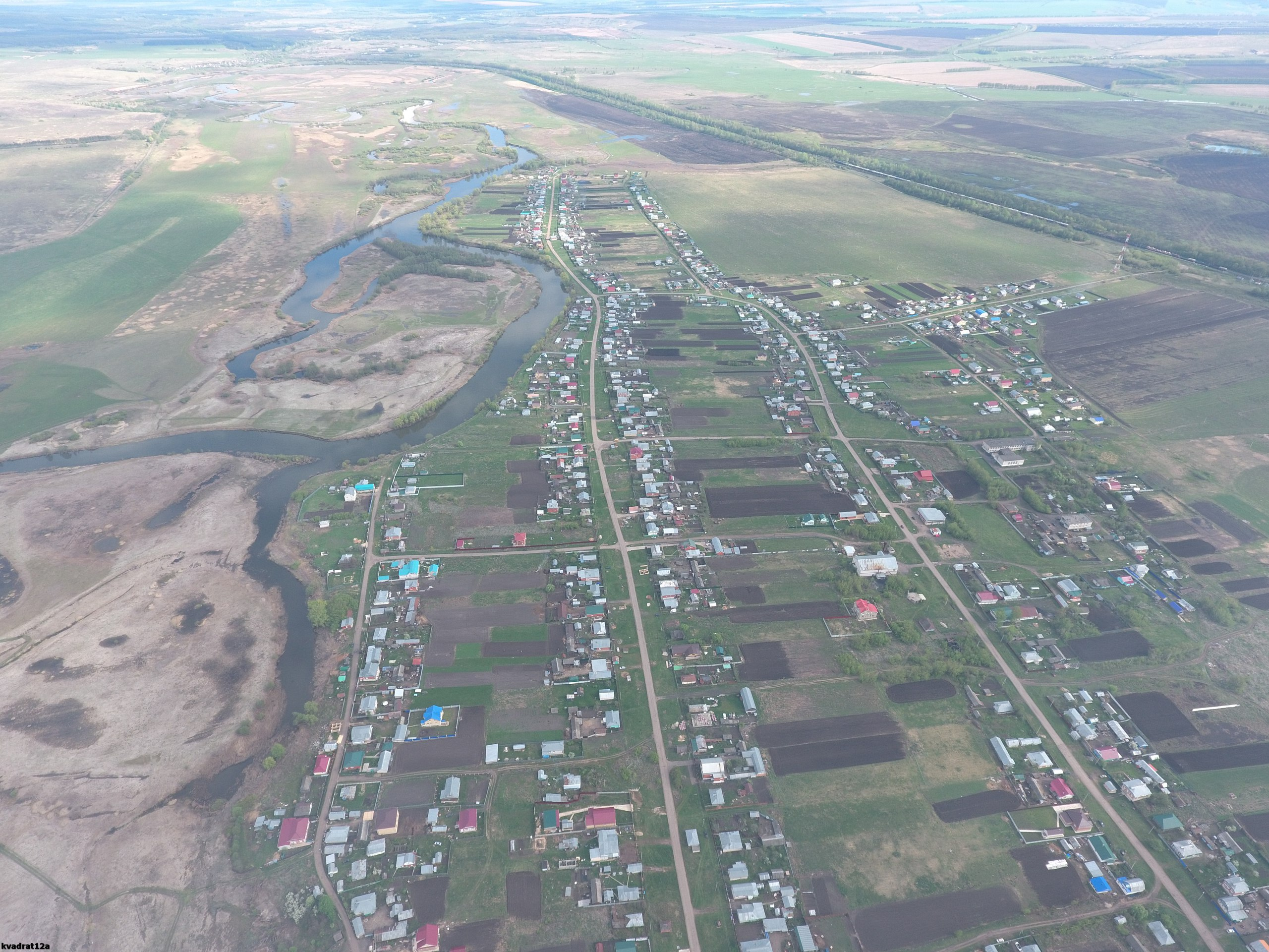 Камкино глазами птиц